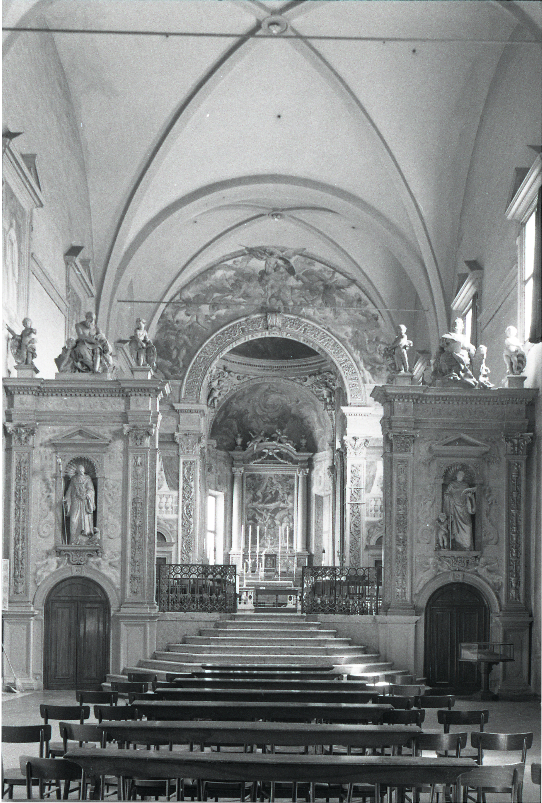 Servizio fotografico : Bologna, 1973 / Paolo Monti. - Strisce: 2, Fotogrammi complessivi: 9 : Negativo b/n, gelatina bromuro d'argento/ pellicola ; 35 mm. - ((Sul portanegativi: NIKMAT Tri-x. - Numeri dei fotogrammi manoscritti a penna nera sulla pellicola in corrispondenza del relativo fotogramma. - Occasione: Depliant e manifesto multiplo musicale di San Michele in Bosco su indicazione del Professor Tito Gotti per la programmazione del Teatro Comunale di Bologna. - Fonte: Agenda di Paolo Monti: Leica 1501-3000 Controllo numerazione (1950-1978), presso Archivio Paolo Monti. - Fonte: Monografia: Conoscenza e coscienza della città: una politica per il centro storico di Bologna, catalogo della mostra, Bologna 1974 (1974)Fattura di Paolo Monti: IV. Commesse/ Fattura n. 28 (1973/12/19), presso Archivio Paolo Monti. - Fonte: Monografia di Renzi, Renzo: San Michele in Bosco, Bologna, Ed. Luigi Parma (1971). - Fonte